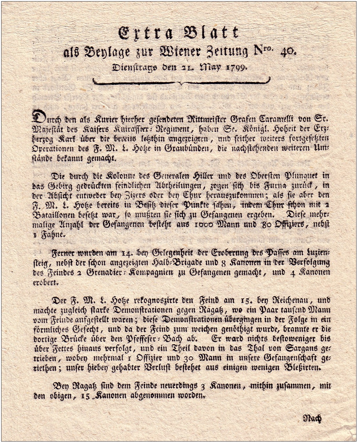 Page from Wiener Zeitung